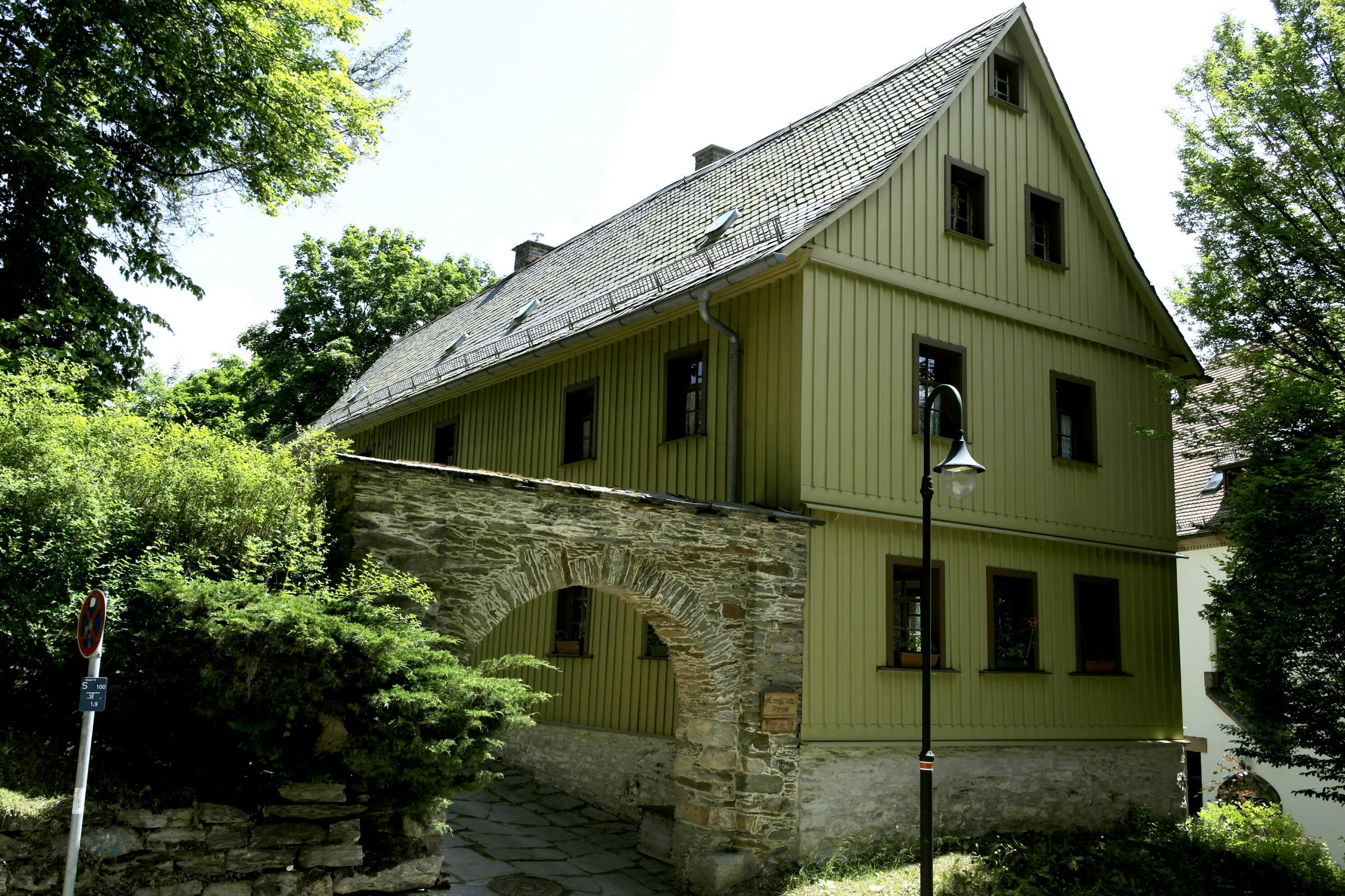 St.Trinitatiskirche in Bad Elster, Pfarramt